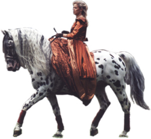 Beschreibung: Baron aus der schützenden Hand Quelle: Fotograf: Heinz Hackmann